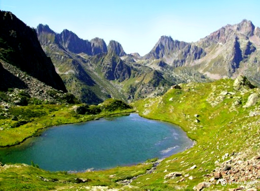 Lago a 2000 metri situato in Val Vogna